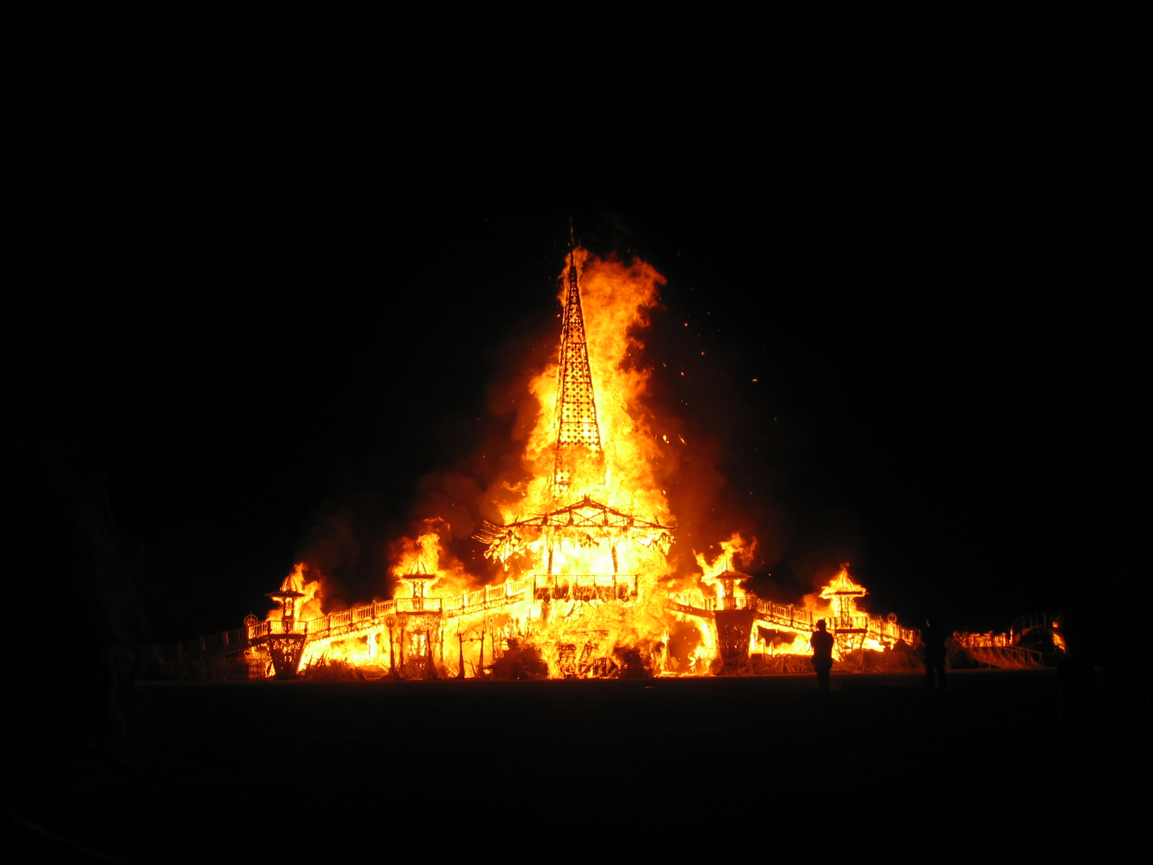 Temple Burn